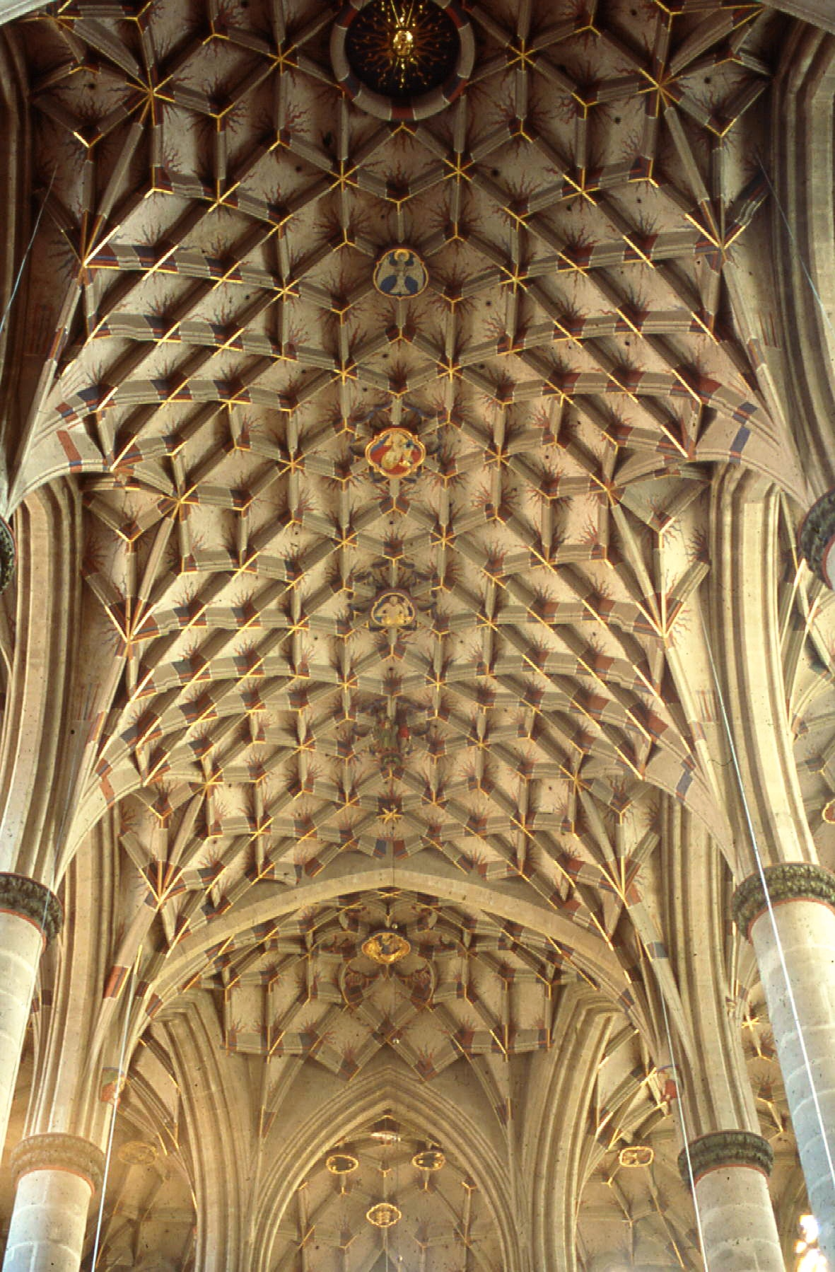 Gmuend, Heilig-Kreuz-Münster. Netzgewölbe des Chors.